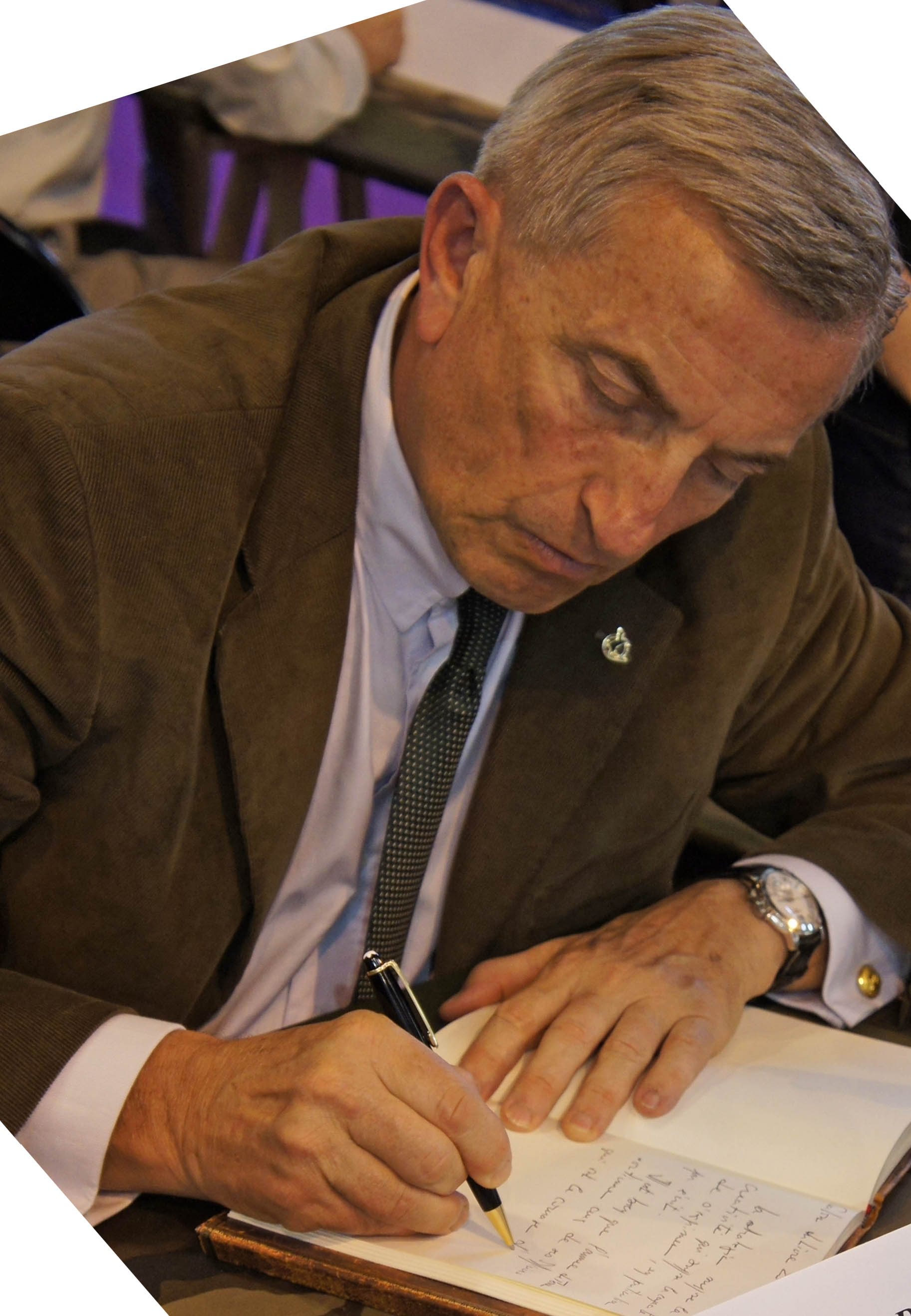 Ecrivain et général Vincent Desportes salon du livre 2012.